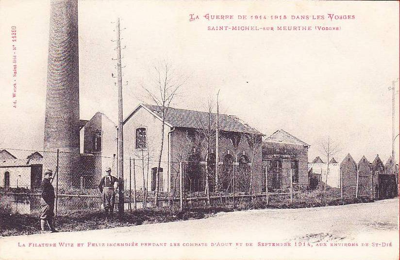 Saint Michel sur Meurthe_Vosges_France